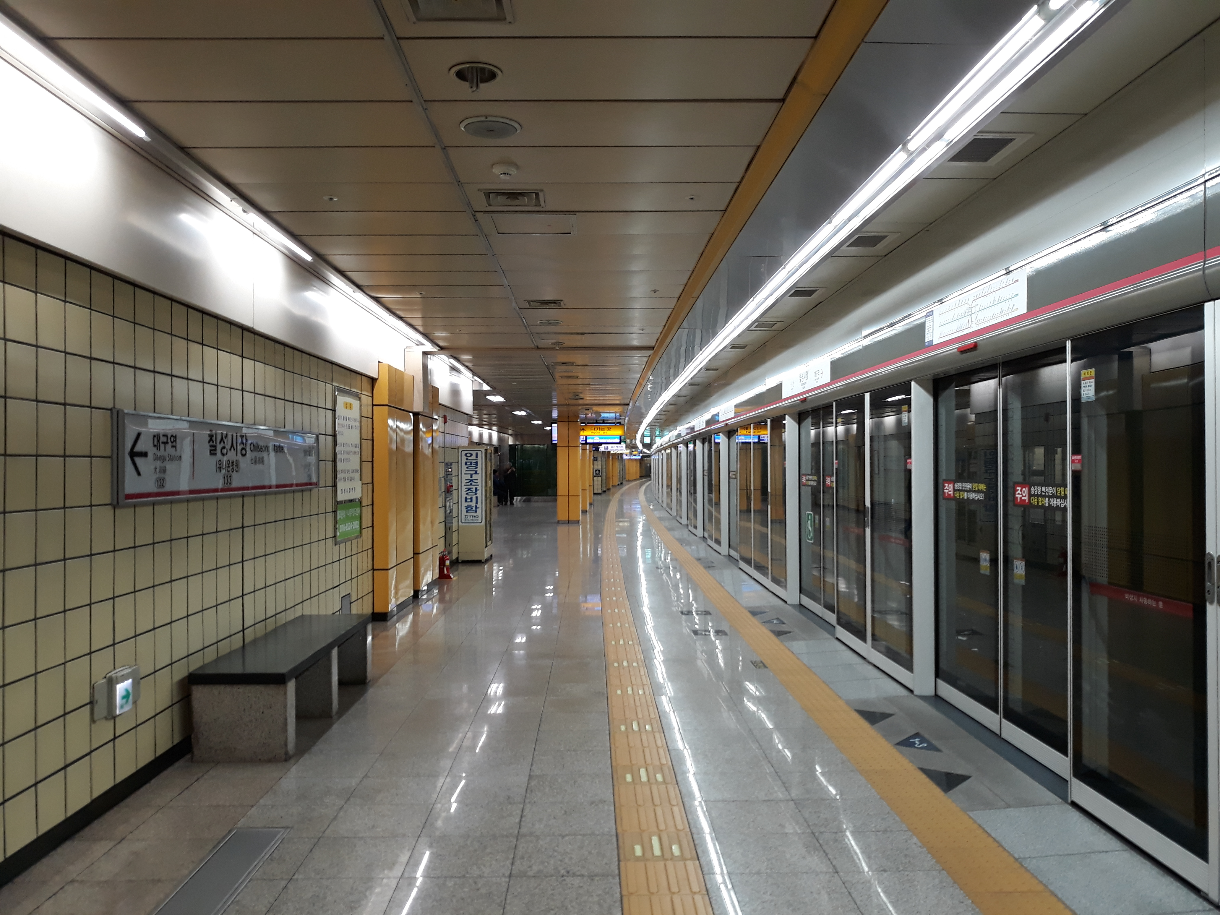 대구 도시철도 1호선 칠성시장역 설화명곡 방면 승강장